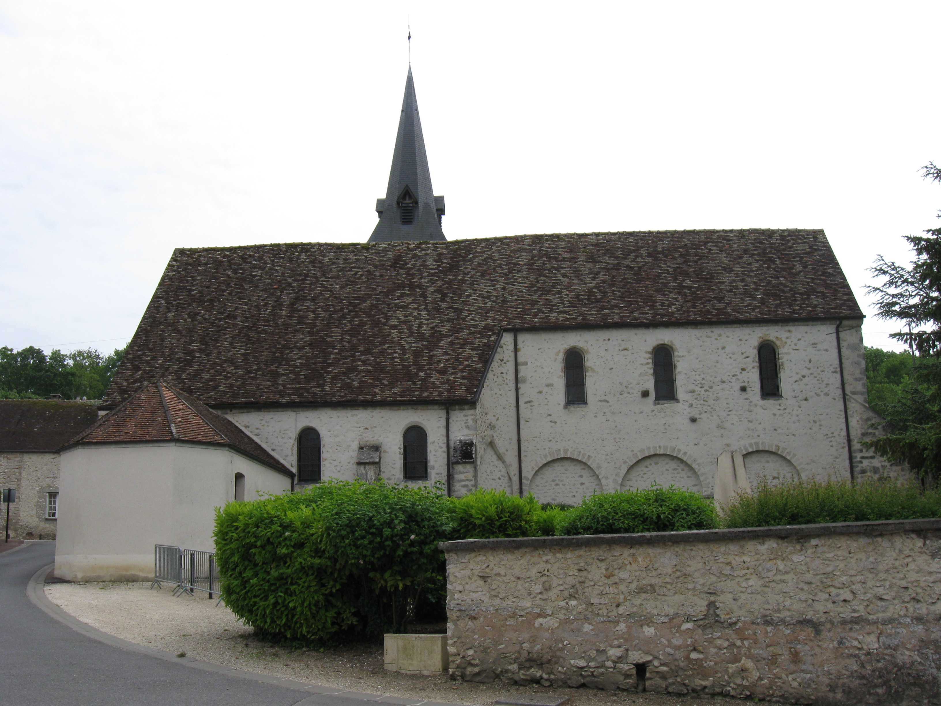 Église Saint-Brice de Saint-Brice. (Seine-et-Marne, région Île-de-France).